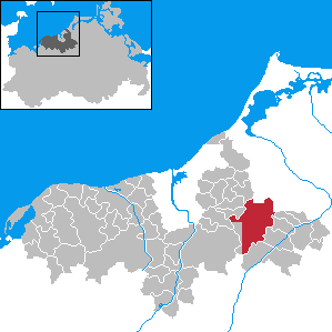 Sanitz in Mecklenburg-Western Pomerania - District Bad Doberan